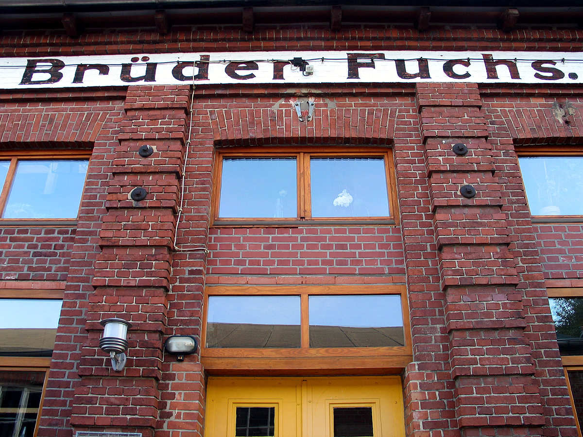 Der mit weißer Farbe auf den Ziegeln der um 1898 errichteten Fabrikhalle aufgebrachte Schriftzug Brüder Fuchs: Nach Albert Gieseler wurde das Gebäude ursprünglich von Louis Tidow, Feuerspritzenfabrik genutzt, ab 1919 dann von der Firma ADMI, Brüder Fuchs ...